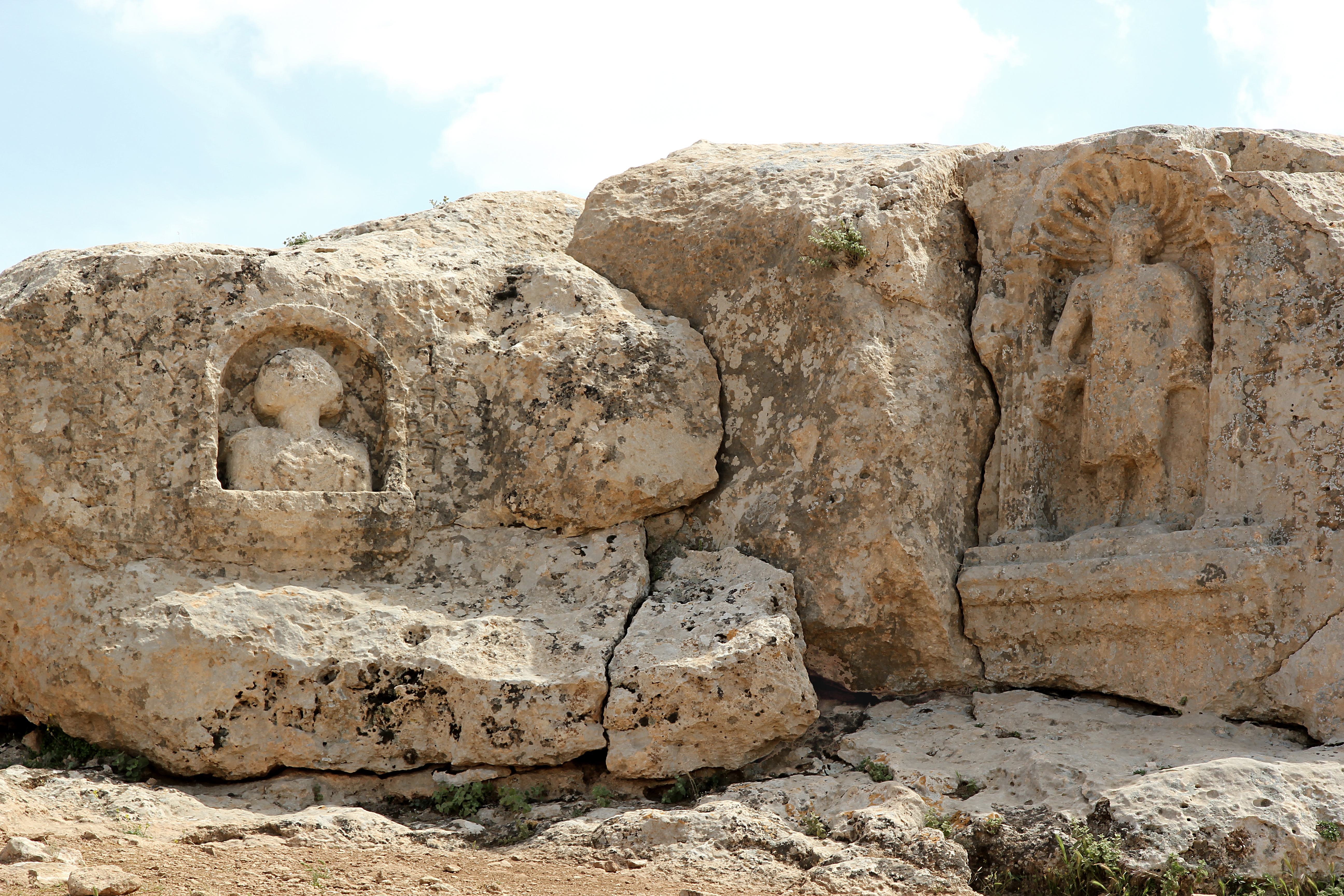 Sumatar, Kultstätte der Sabier in der Südosttürkei, Reliefs auf dem Zentralhügel